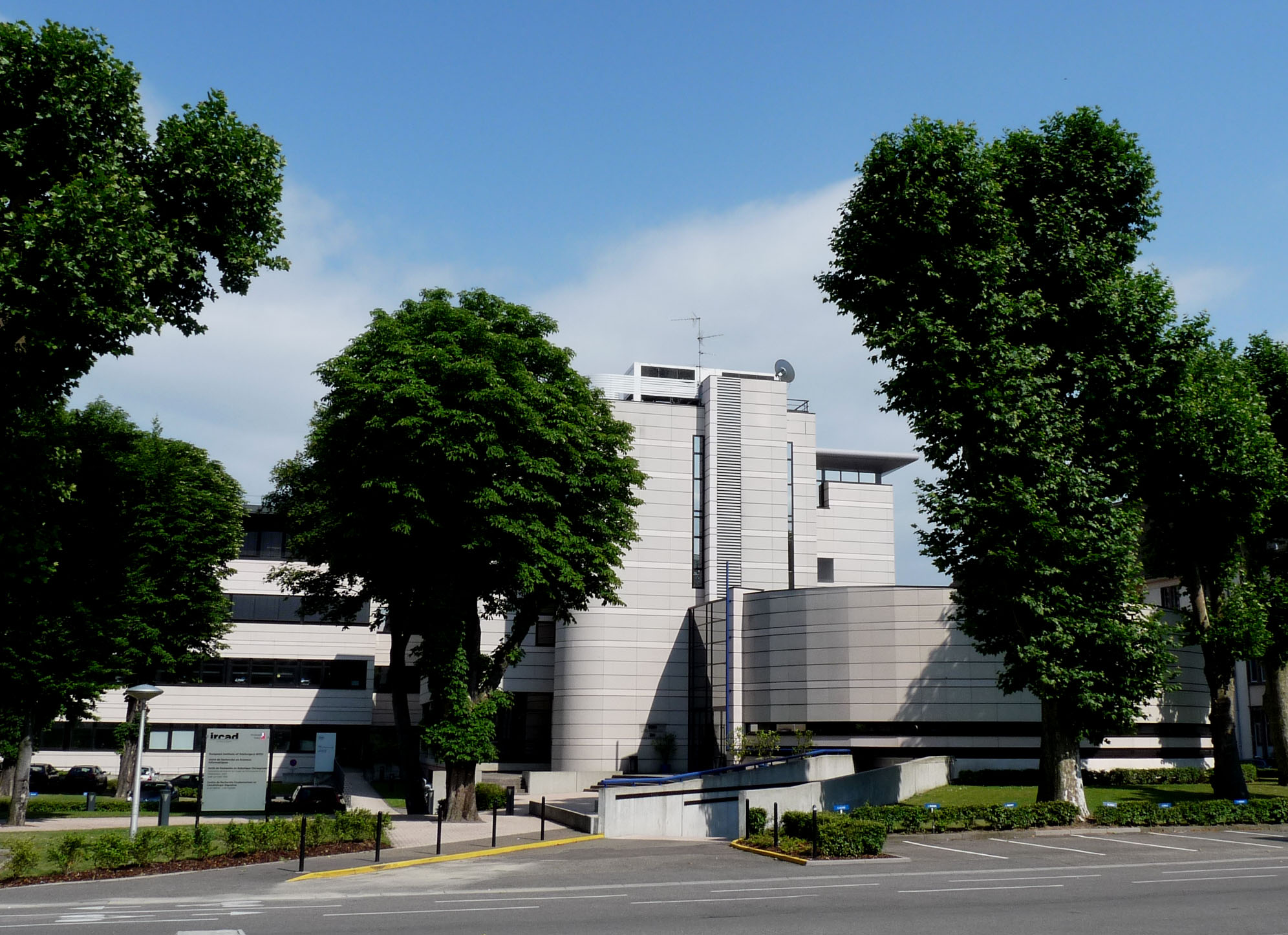 Institut de recherche contre les cancers de l'appareil digestif (IRCAD), Strasbourg